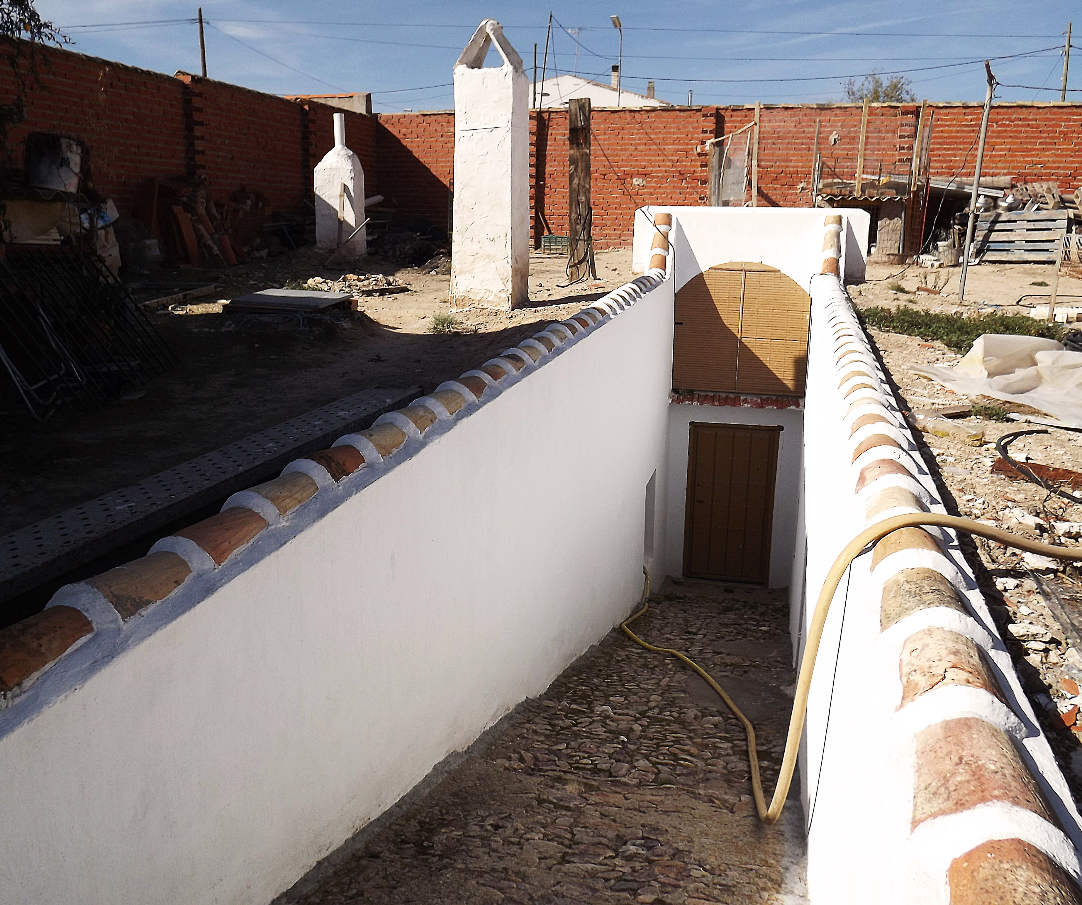 Silo (vivienda subterránea) de Villacañas, Toledo